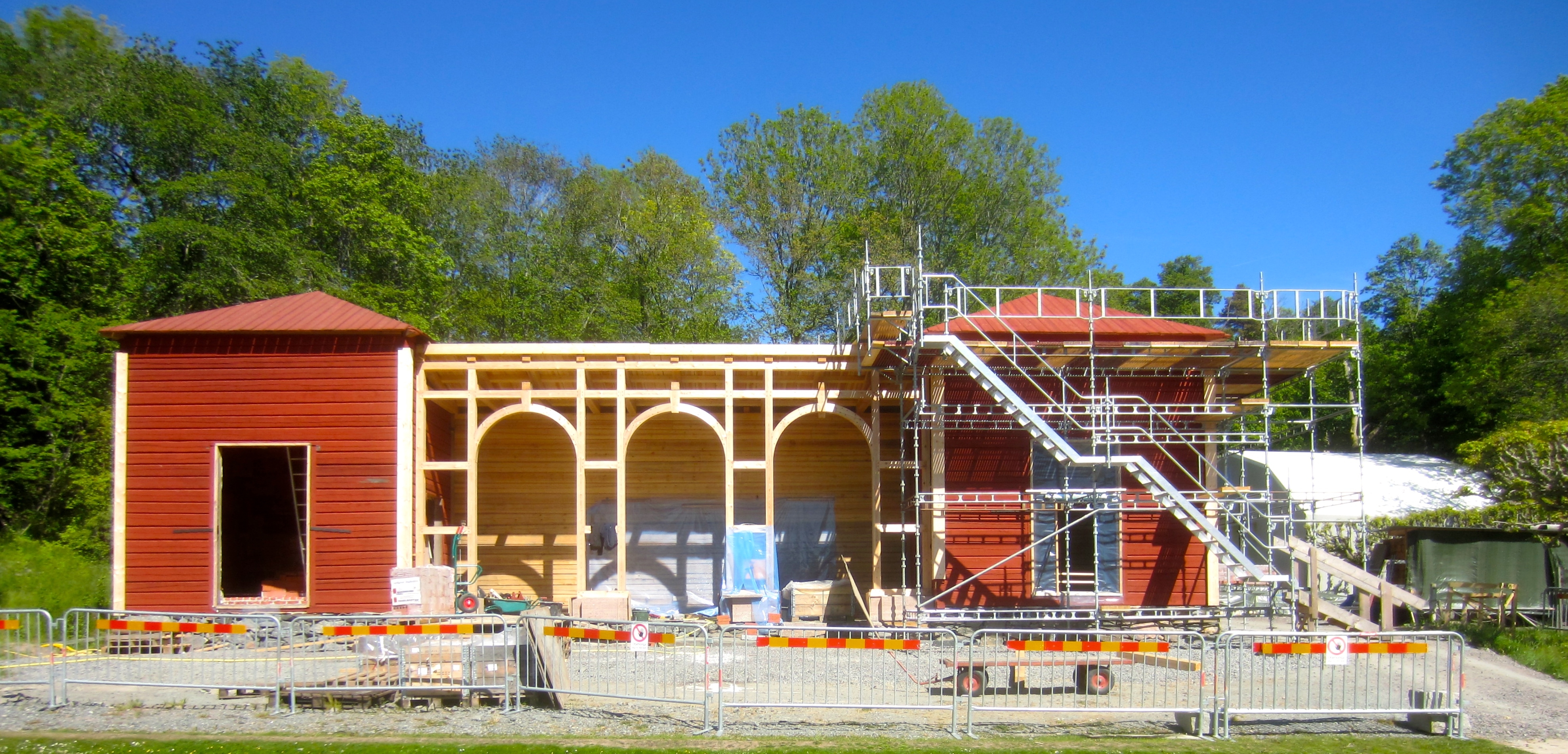 Orangeriet under byggnad, Gunnebo slott 2015.